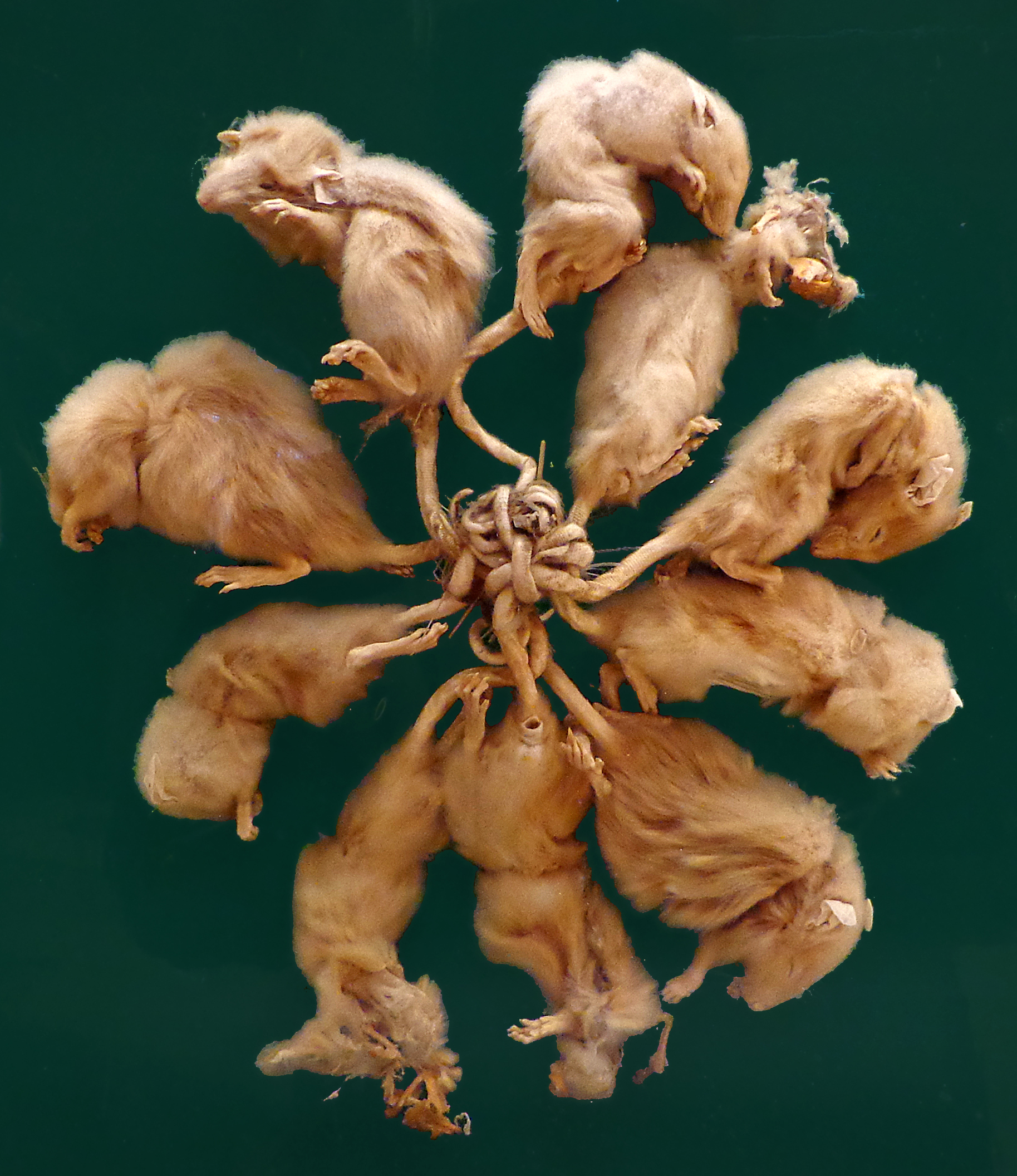 Roi des rats